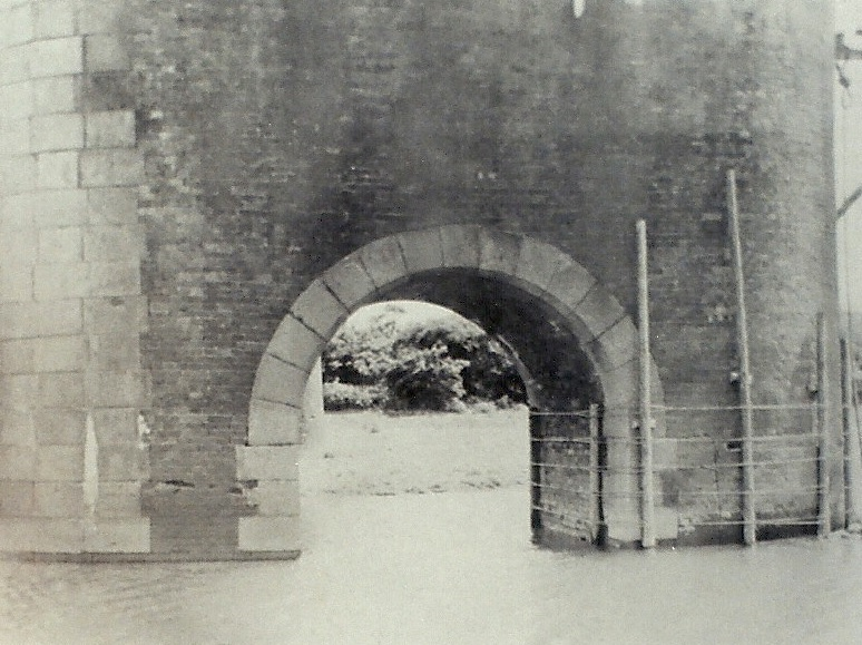 1935年地震後緊急補強的後龍溪橋第7號橋墩